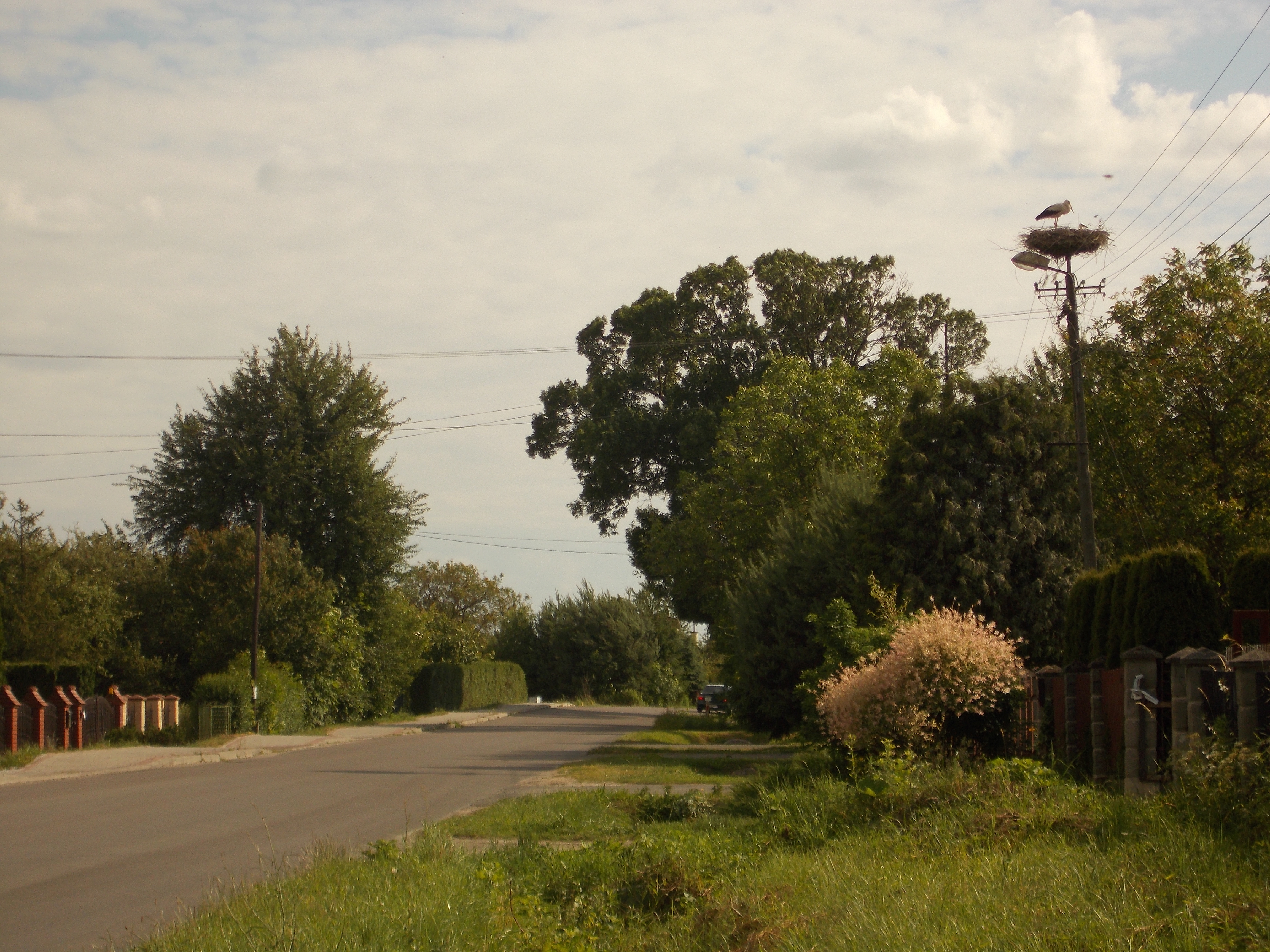 Bocianie gniazdo w miejscowości Dąbków 56